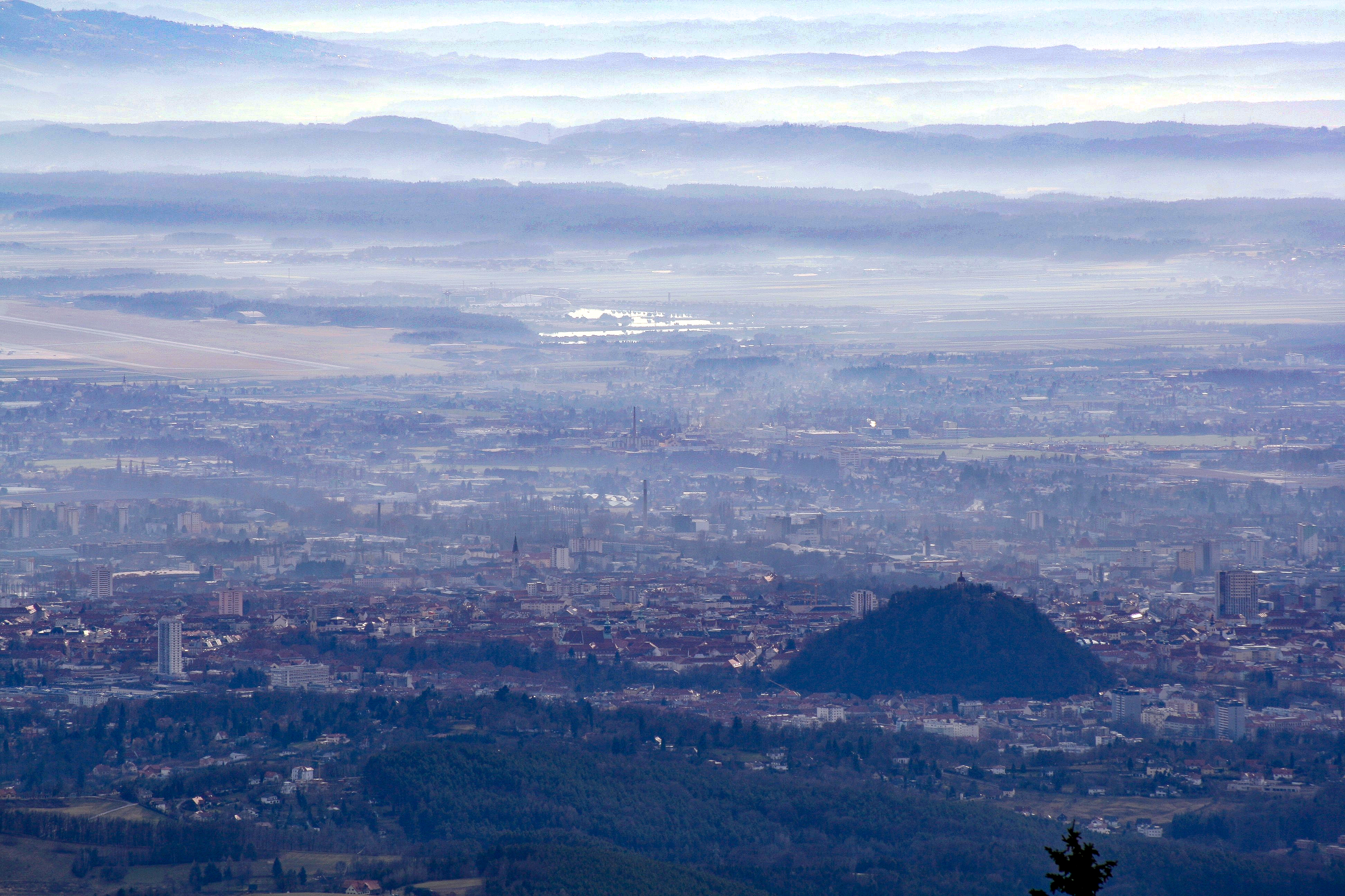 Graz, vom Gipfel des Schöckl (auch: Schöckel) aus gesehen (im Nebel)